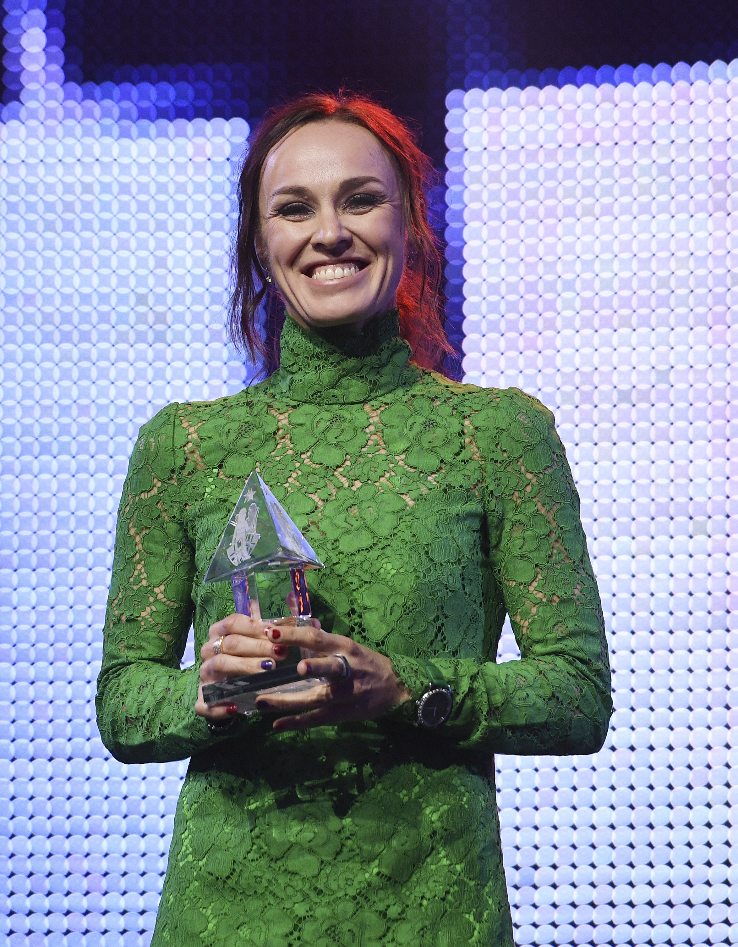 Davos, 24.11.2017. Sport, 14. Internationale Sportnacht Davos 2017. Martina Hingis mit dem Davoser Kristall. Copyright by: foto-net / Kurt Schorrer